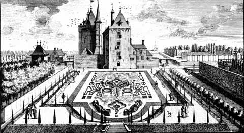 Castle Zuidwijk near Wassenaer in 1712 by J. Lamsvelt